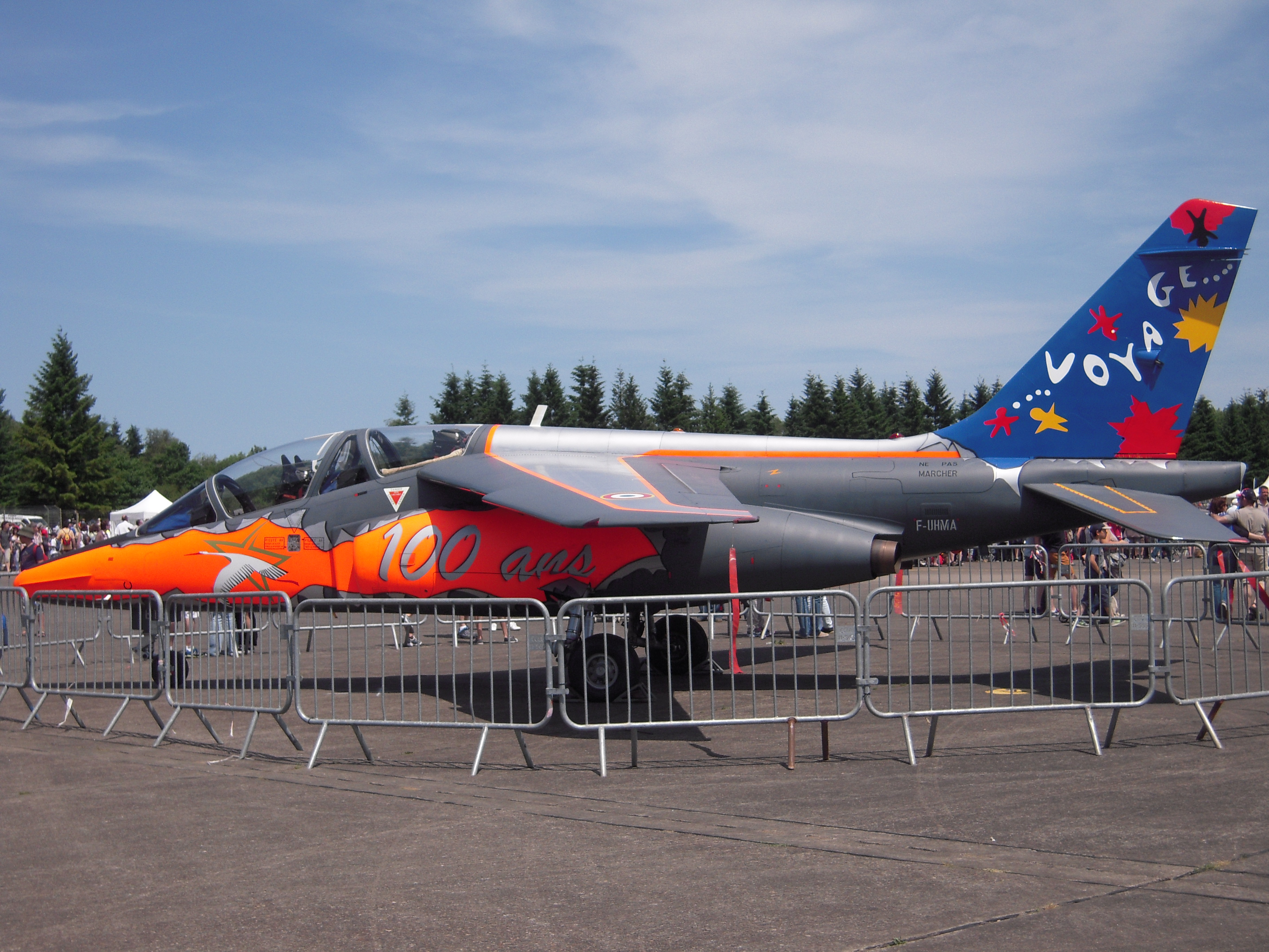 Alpha Jet - avec une livrée spéciale pour le centenaire de la BA 705